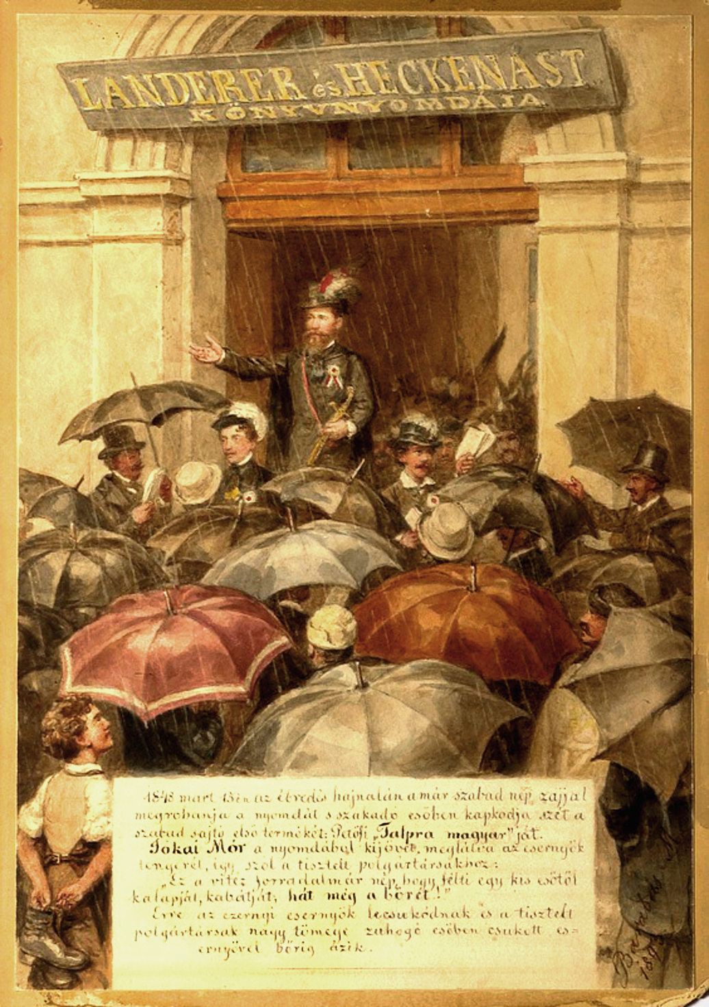 a képen Barabás a márciusi lázas napok egyik legkimagaslóbb mozzanatát örökítette meg, midőn Jókai Petőfi és Vasvári, a Landerer és Heckenast-féle nyomda előtt, az esőben tolongó sokaságnak, a szabadsajtó első termékét, a "Nemzeti dal"-t osztogatják. A kép alján lévő felirat a művésztől: 1848. mart. 15-én az ébredés hajnalán a már szabad nép zajjal megrohanja a nyomdát s szakadó esőben kapkodja szét a szabad sajtó első termékét: Petőfi "Talpra magyar"-ját. Jókai Mór a nyomdából kijövet, meglátva az esernyők tengerét, így szól a tisztelt polgártársakhoz: "Ez a vitéz forradalmár nép, hogy félti egy kis esőtől kalapját, kabátját, hát még a bőrét!" Erre az ezernyi esernyők becsukódnak és a tisztelt polgártársak nagy tömege zuhogó esőben csukott esernyővel bőrig ázik.